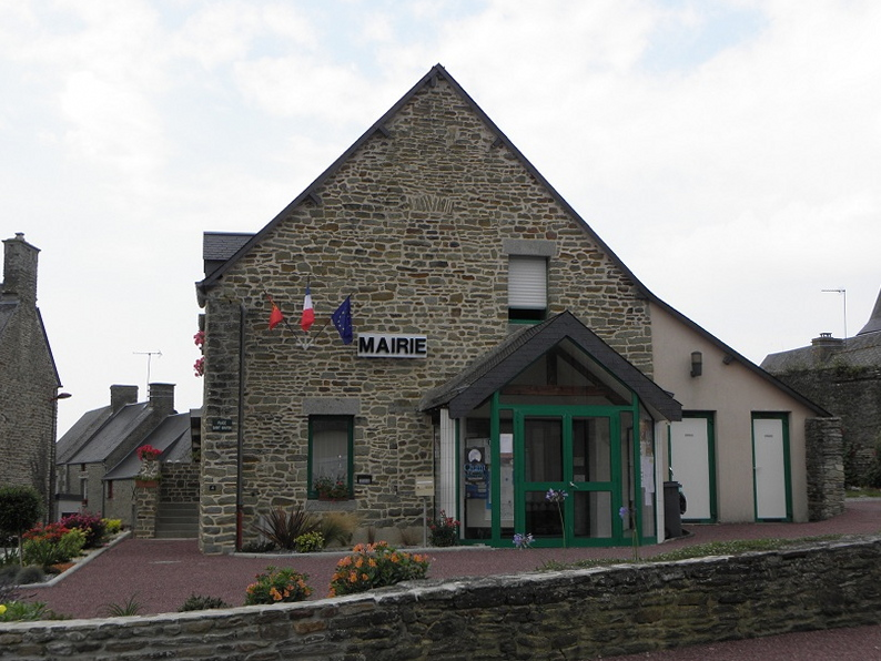 Mairie de Servon (50).